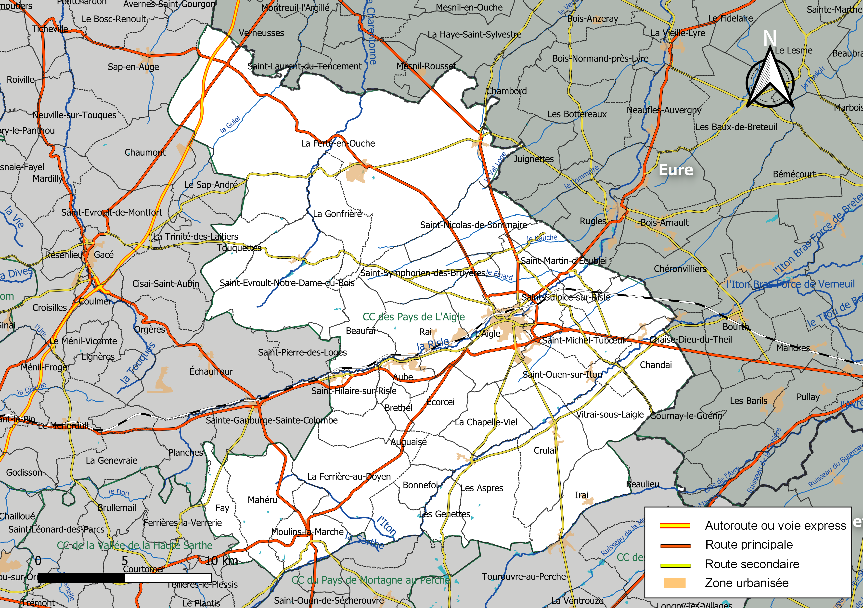 Carte géographique de la Communauté de communes des Pays de L'Aigle, département de l'Orne, France. Composition au 1er janvier 2019.